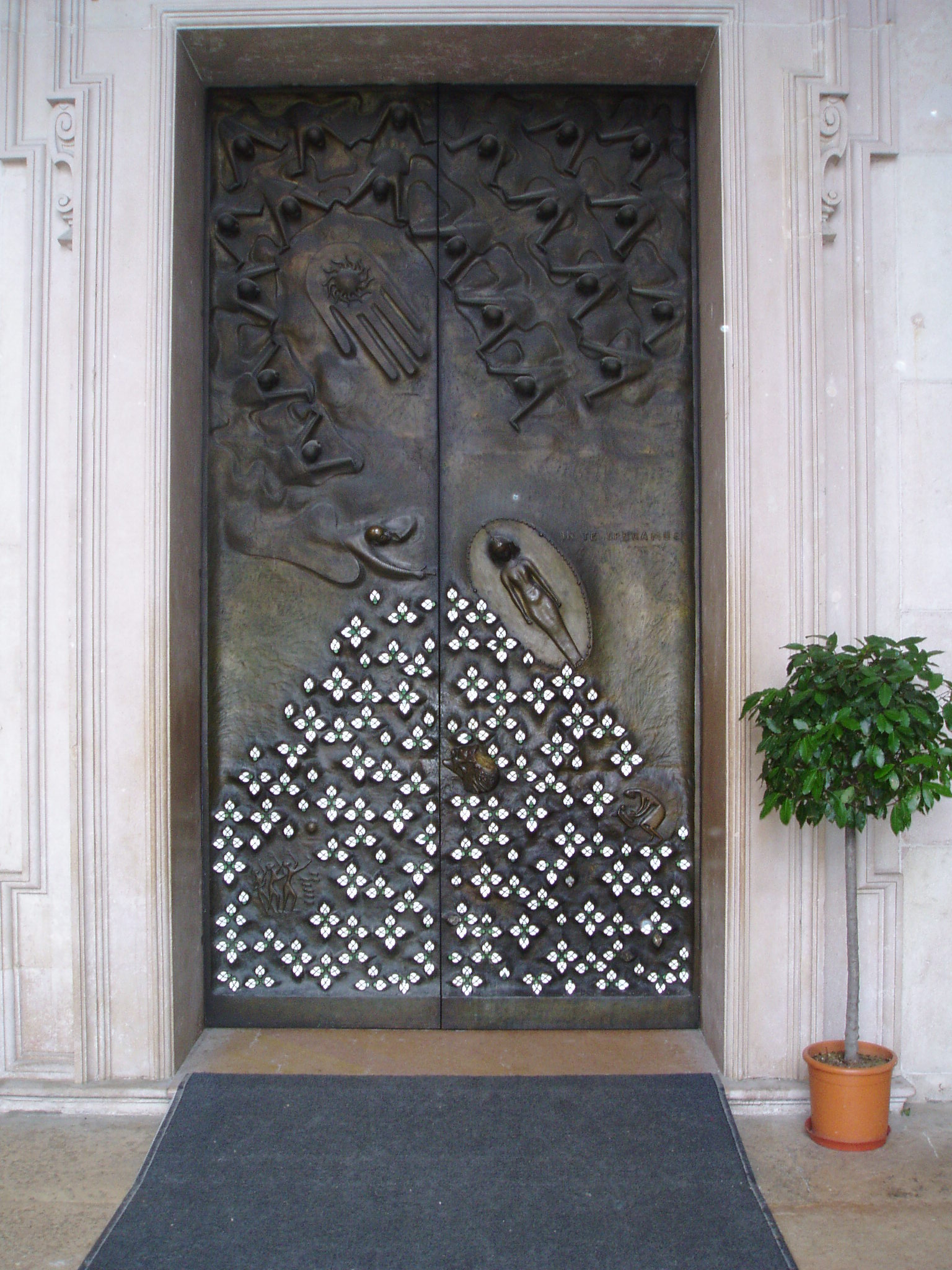 "Tor der Hoffnung". Rechte Bronzetür am Domportal des Salzburger Dom, geschaffen von Ewald Mataré (1887-1965) in 1957/58. Textquelle: V.Friedrich: "Der Dom zu den heiligen Rupert und Virgil in Salzburg ISBN 978-3-89643-676-4. Bild: selbst